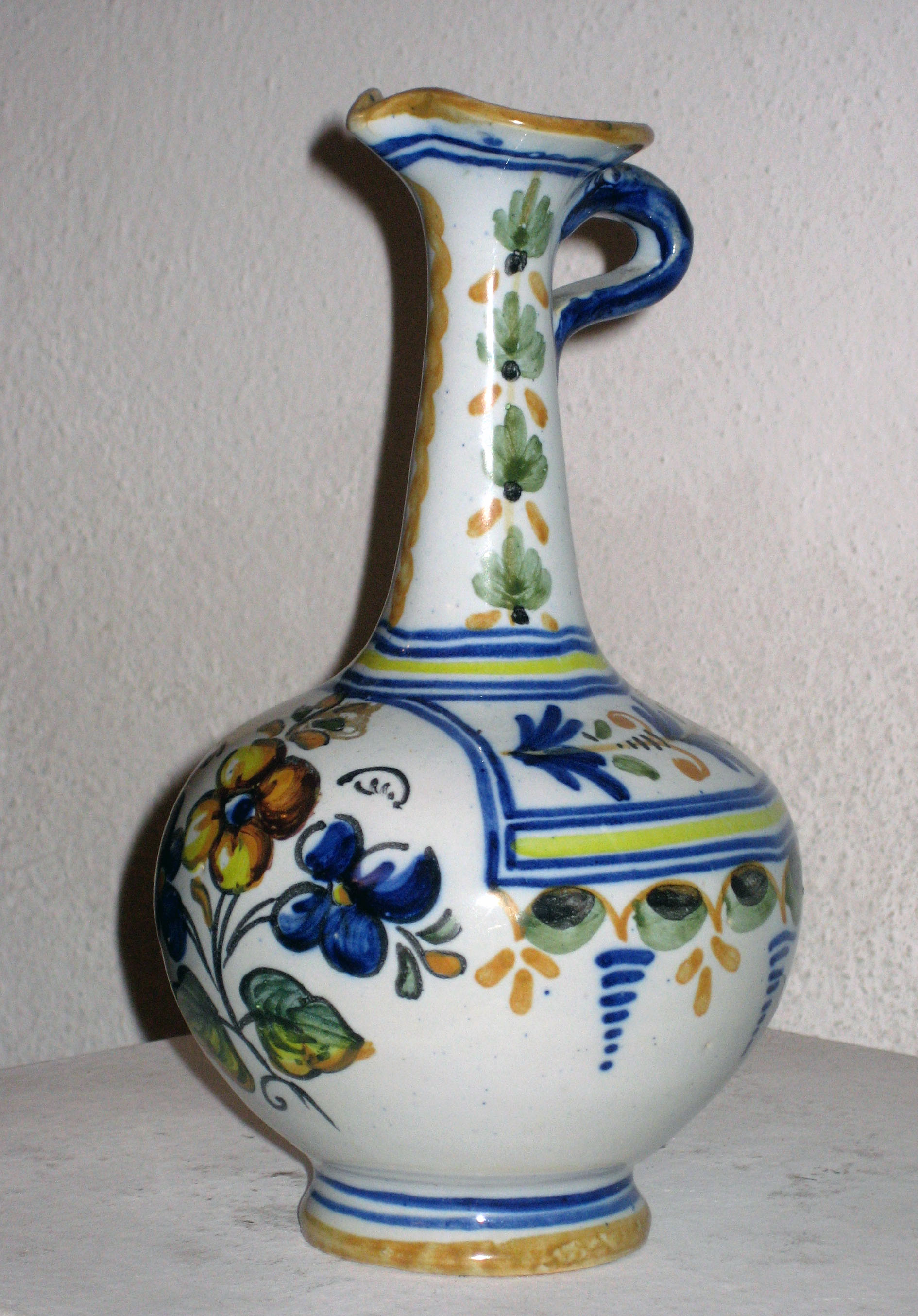 Aceitera de cerámica de Talavera de la Reina Spain